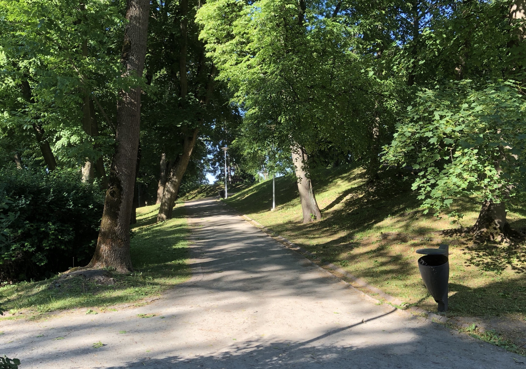 Lindaberg im Jahr 2018